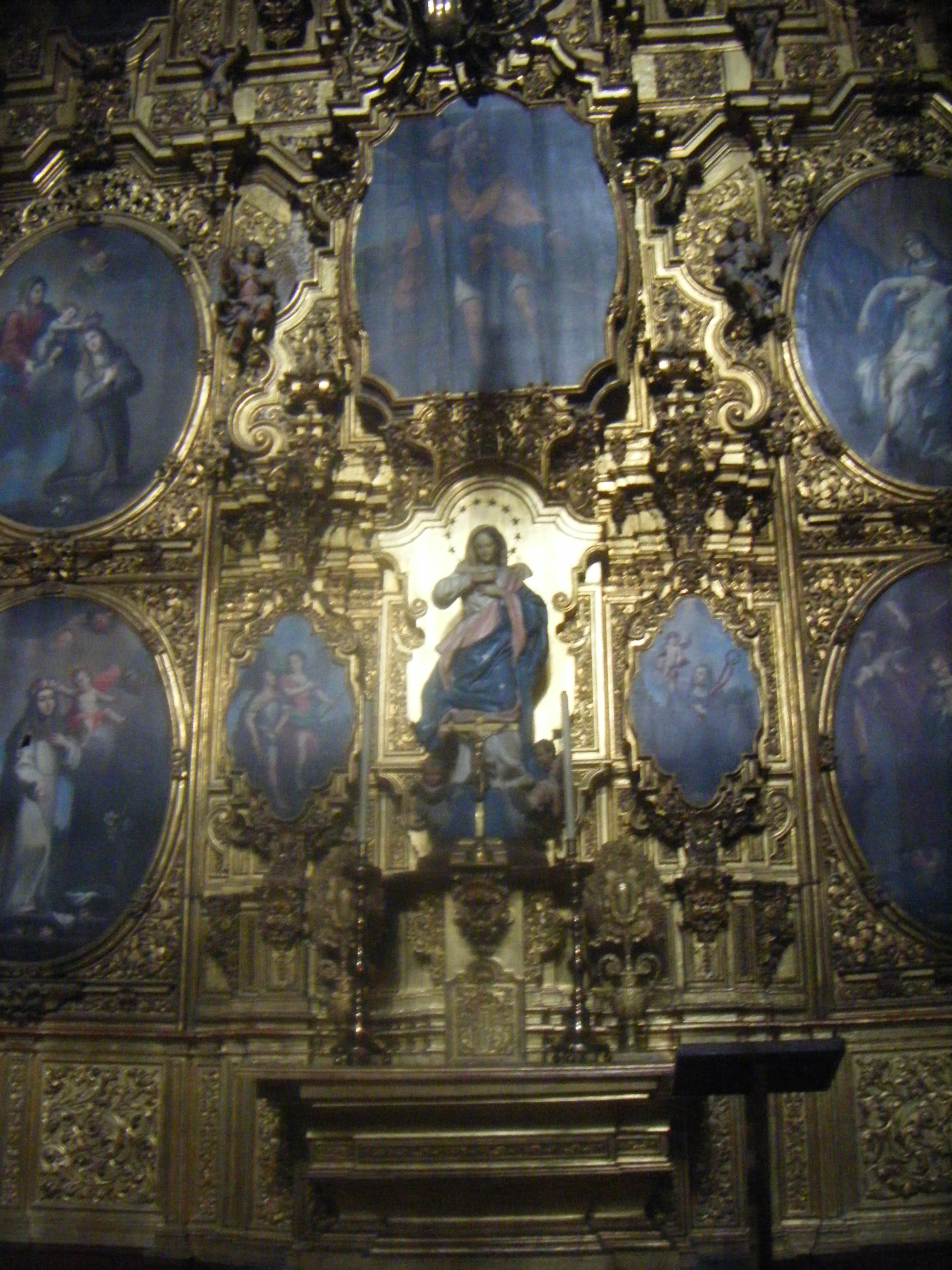 Retablo principal de la capilla de la Inmaculada Concepción (anteriormente capilla de Santa Ana), en la Catedral de México.